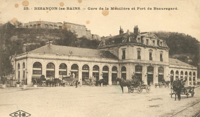 La gare de la Mouillère et le fort de Beauregard à Besançon (Doubs, France).